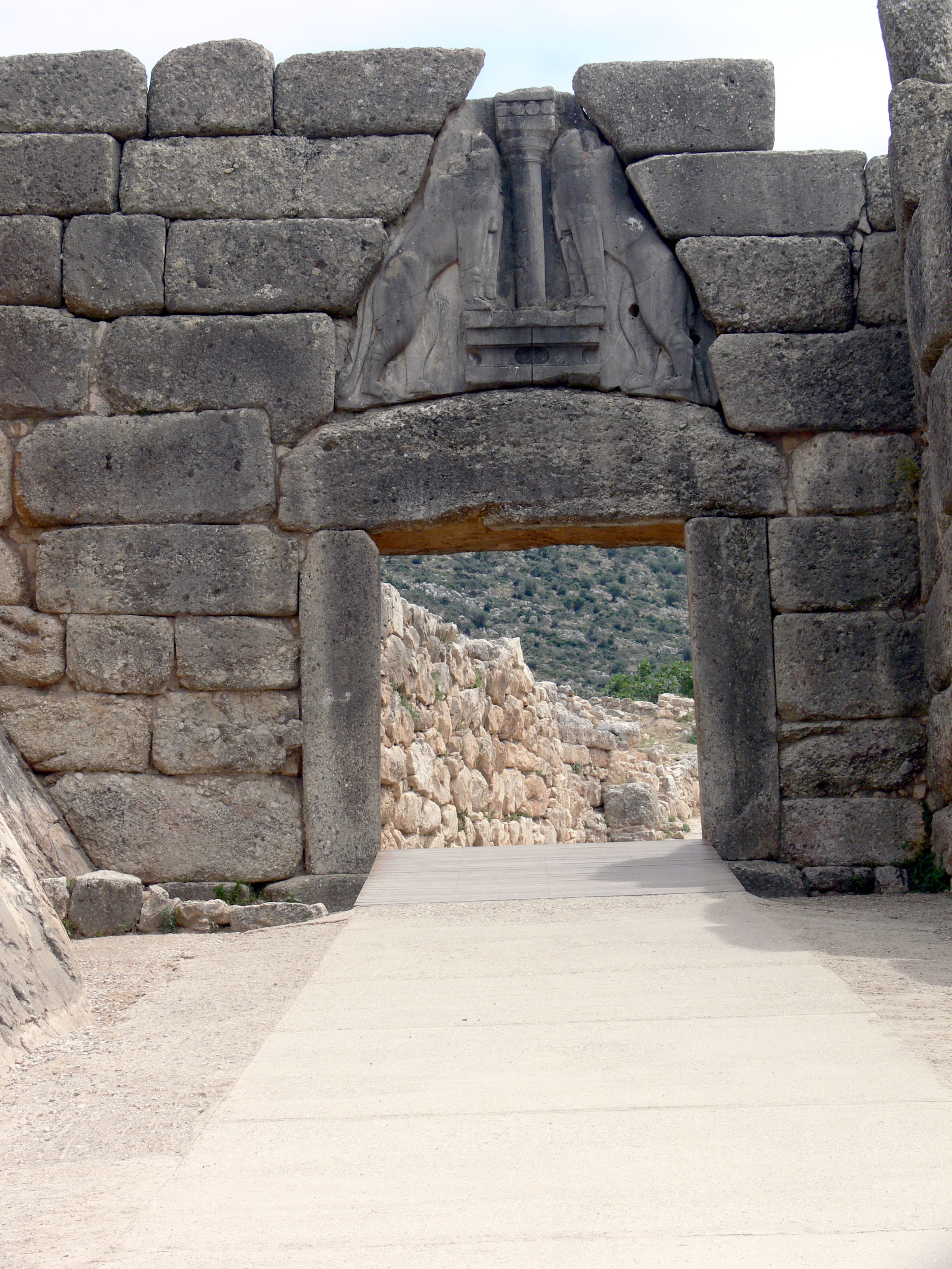 Mykene Palast. Löwentor